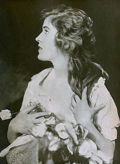 Violet Heming